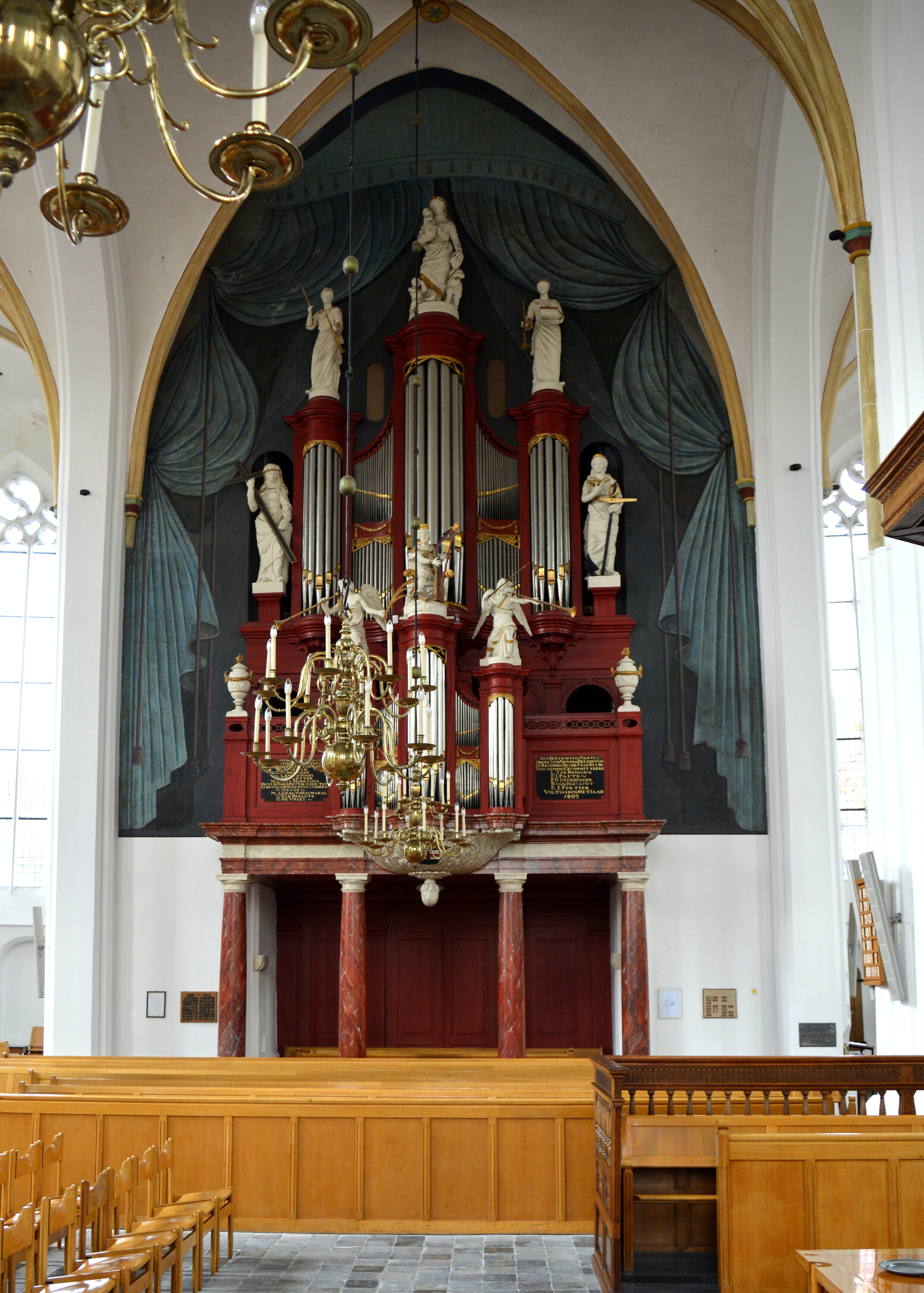 Grote- of Stefanuskerk, Hasselt, orgel